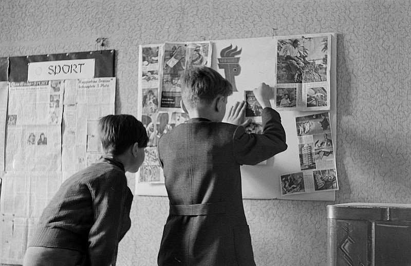 Original image description from the Deutsche FotothekZwei Jungen beim Erstellen einer Pionier-Wandzeitung